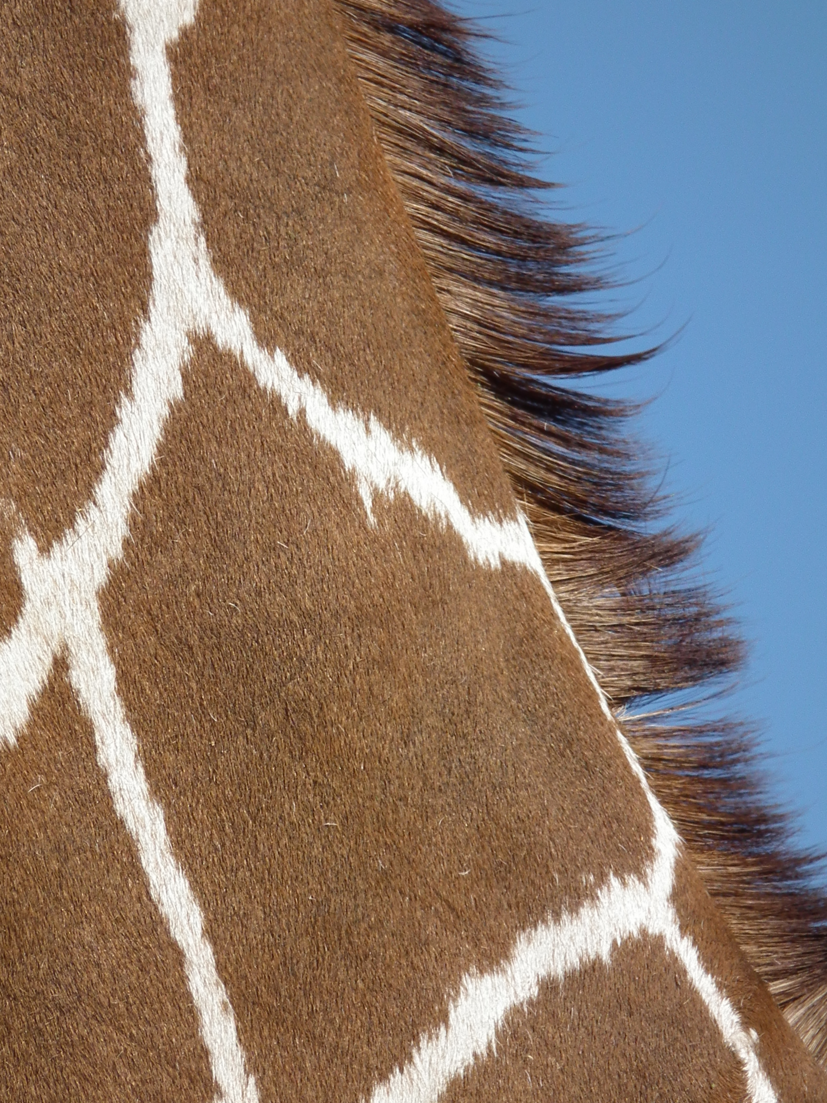 Netzgiraffe (Giraffa camelopardalis reticulata)